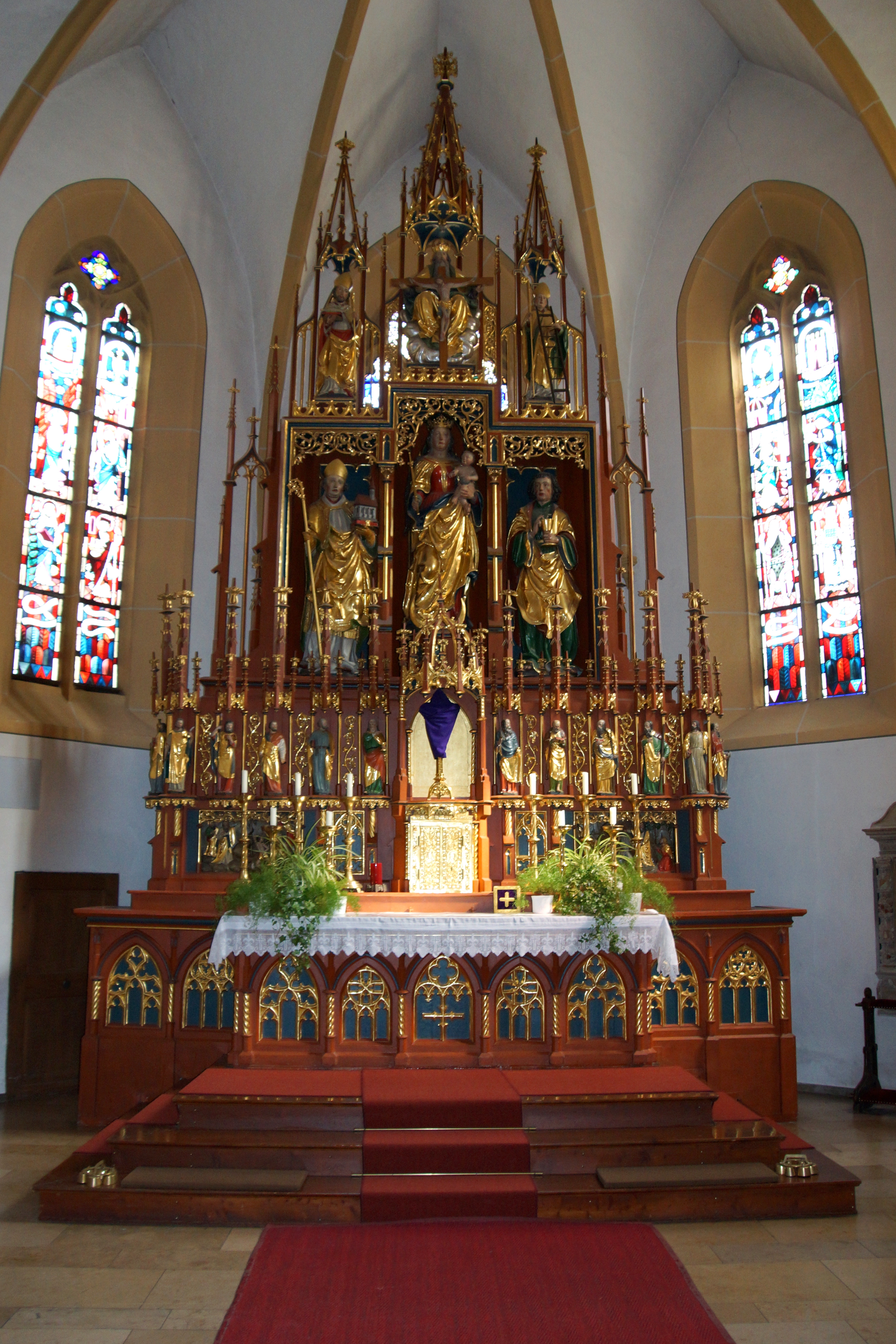 Die katholische Pfarrkirche Mariä Himmelfahrt in Hirschau in der Oberpfalz